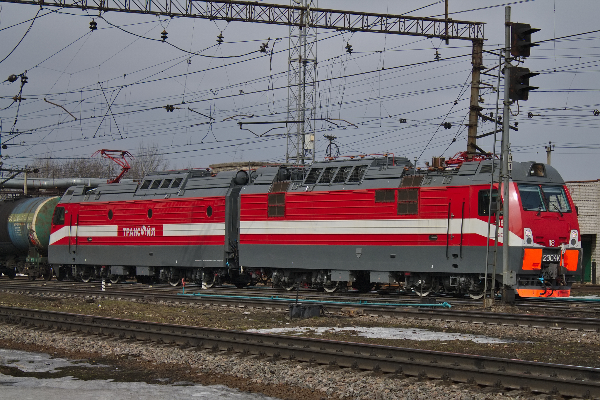 2ЭС4К-118, Трансойл, Кириши. см. фото 498578 в альбоме автора